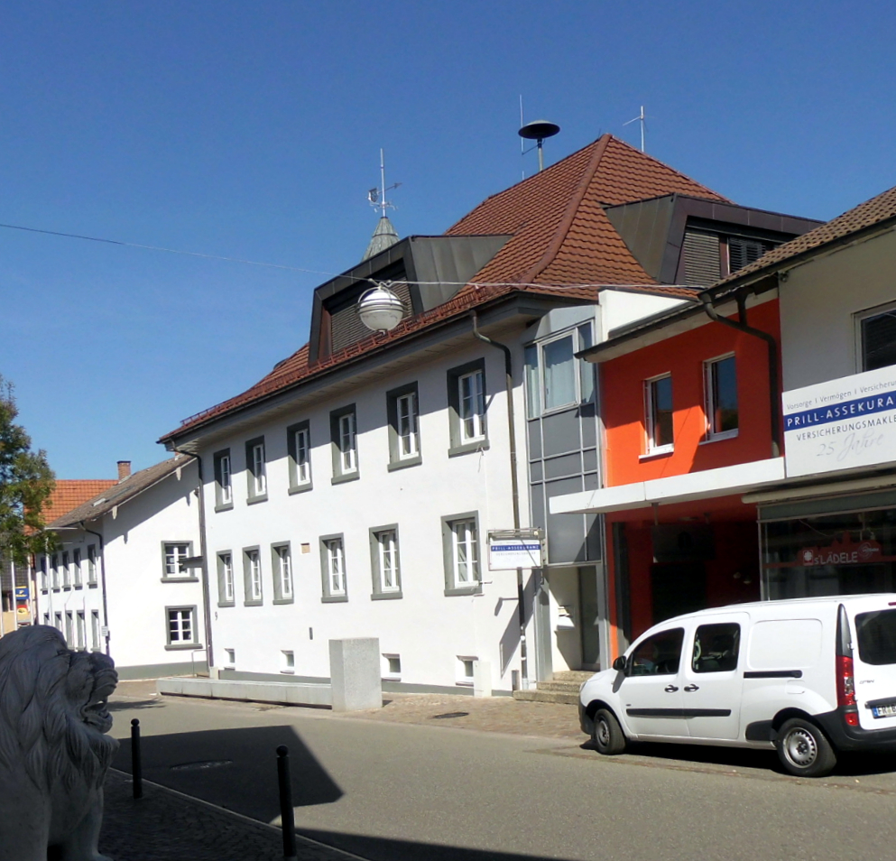 Stadtverwaltung (Rathaus) in Heitersheim, Baden